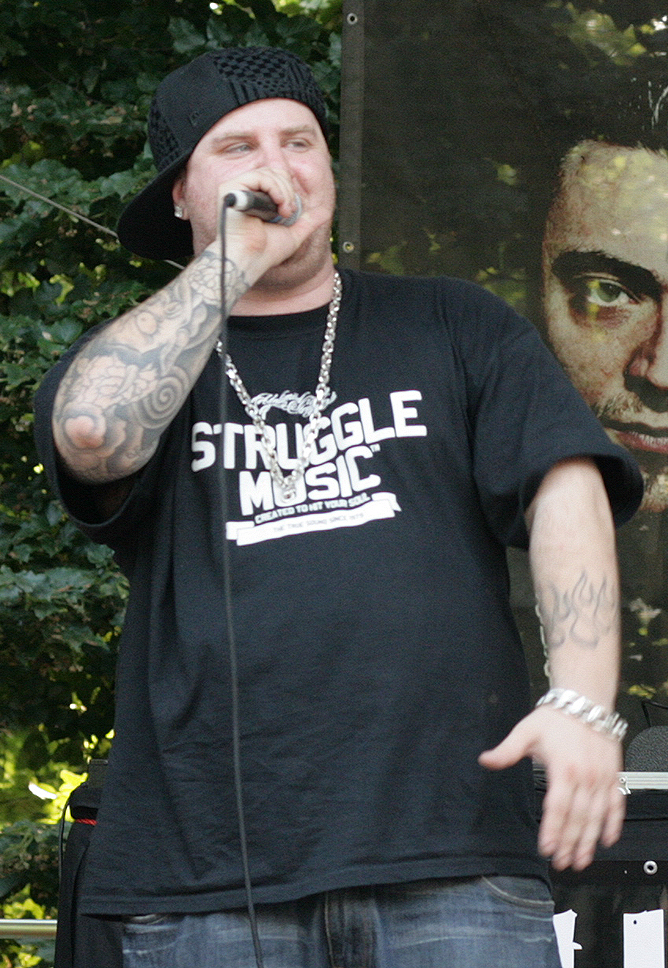 Il rapper italiano Jake La Furia in concerto con i Club Dogo nel 2007